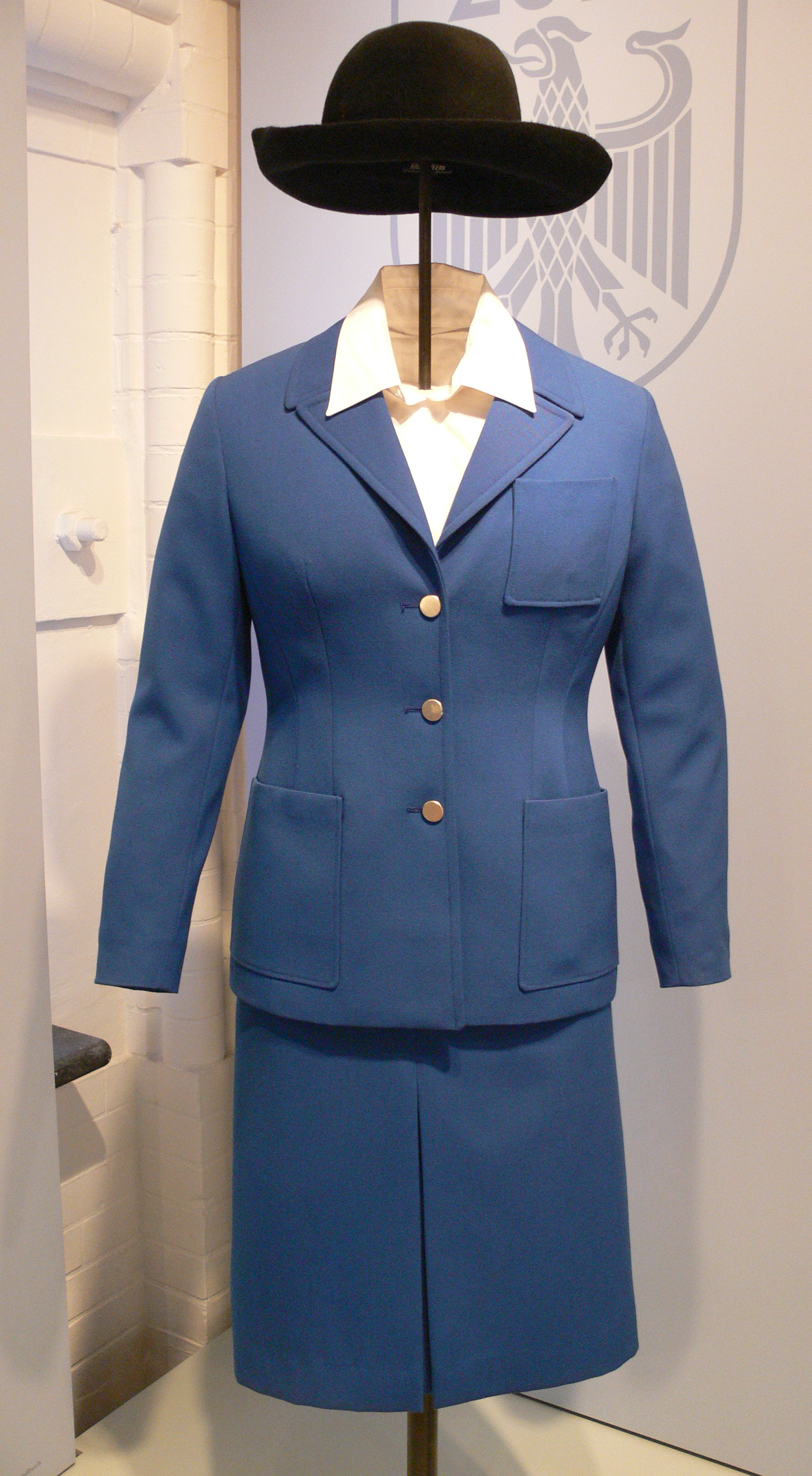 Hamburg, Deutsches Zollmuseum: Dienstkleidung einer Zollabfertigungsbeamtin der Bundeszollverwaltung, 1976–1982, entworfen von Heinz Oestergaard DZM 1.000.554, 1.000.556, 1.012.930